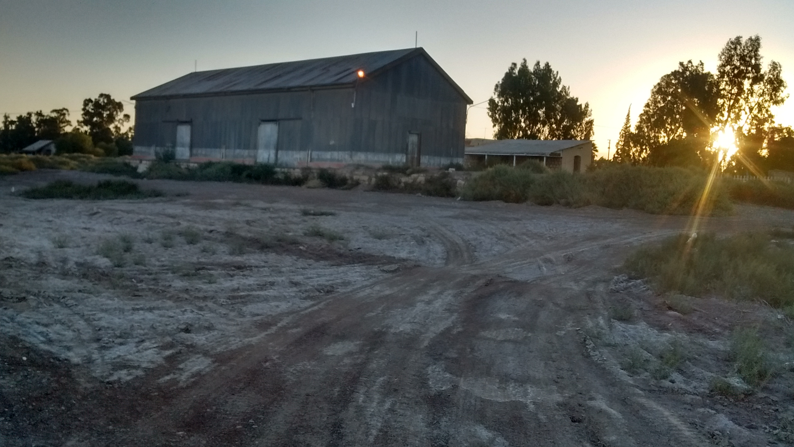 La estación Angaco Norte vista desde sus cercanías al atardecer.